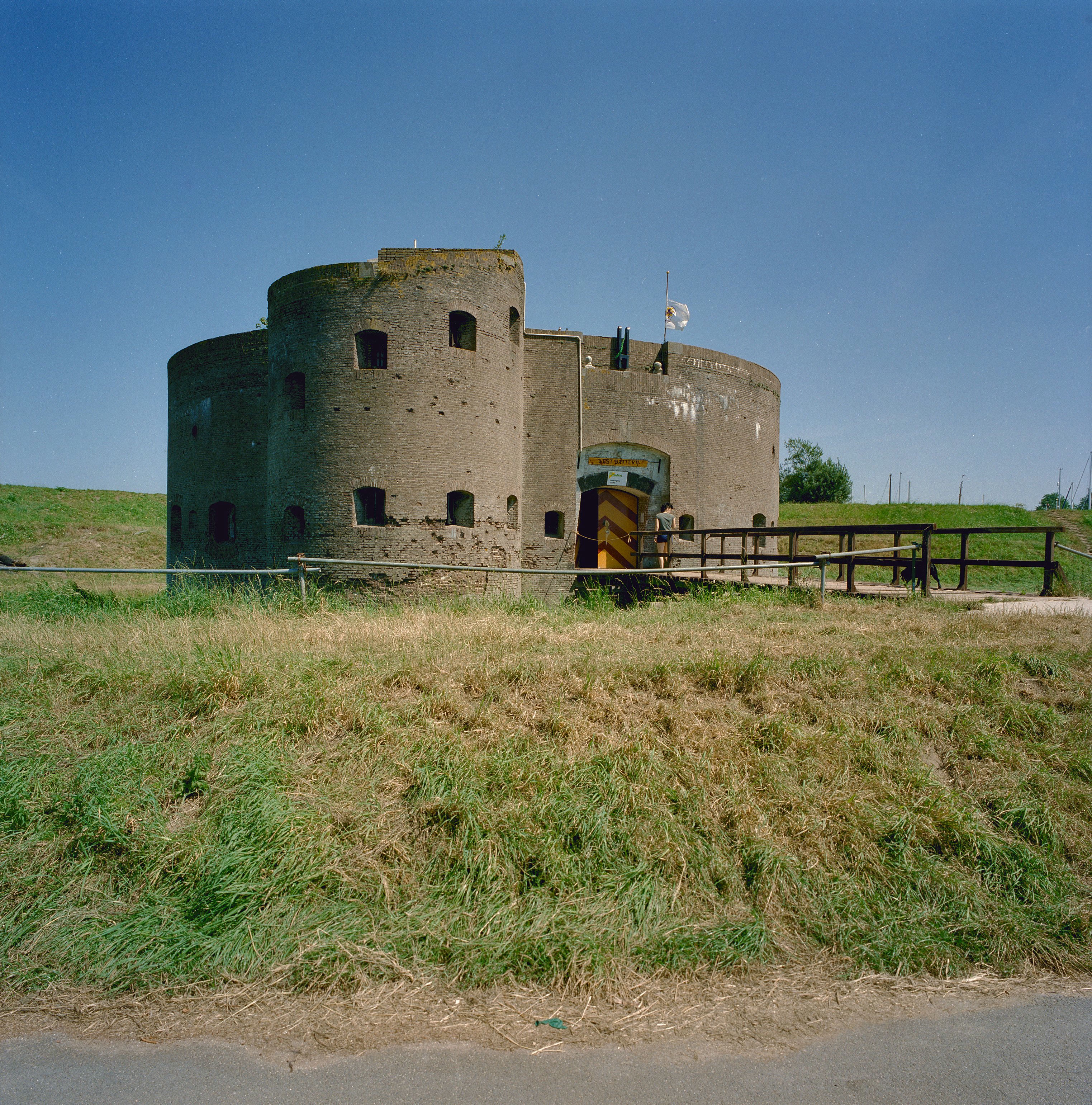 Westbatterij Muiden: Overzicht westbatterij